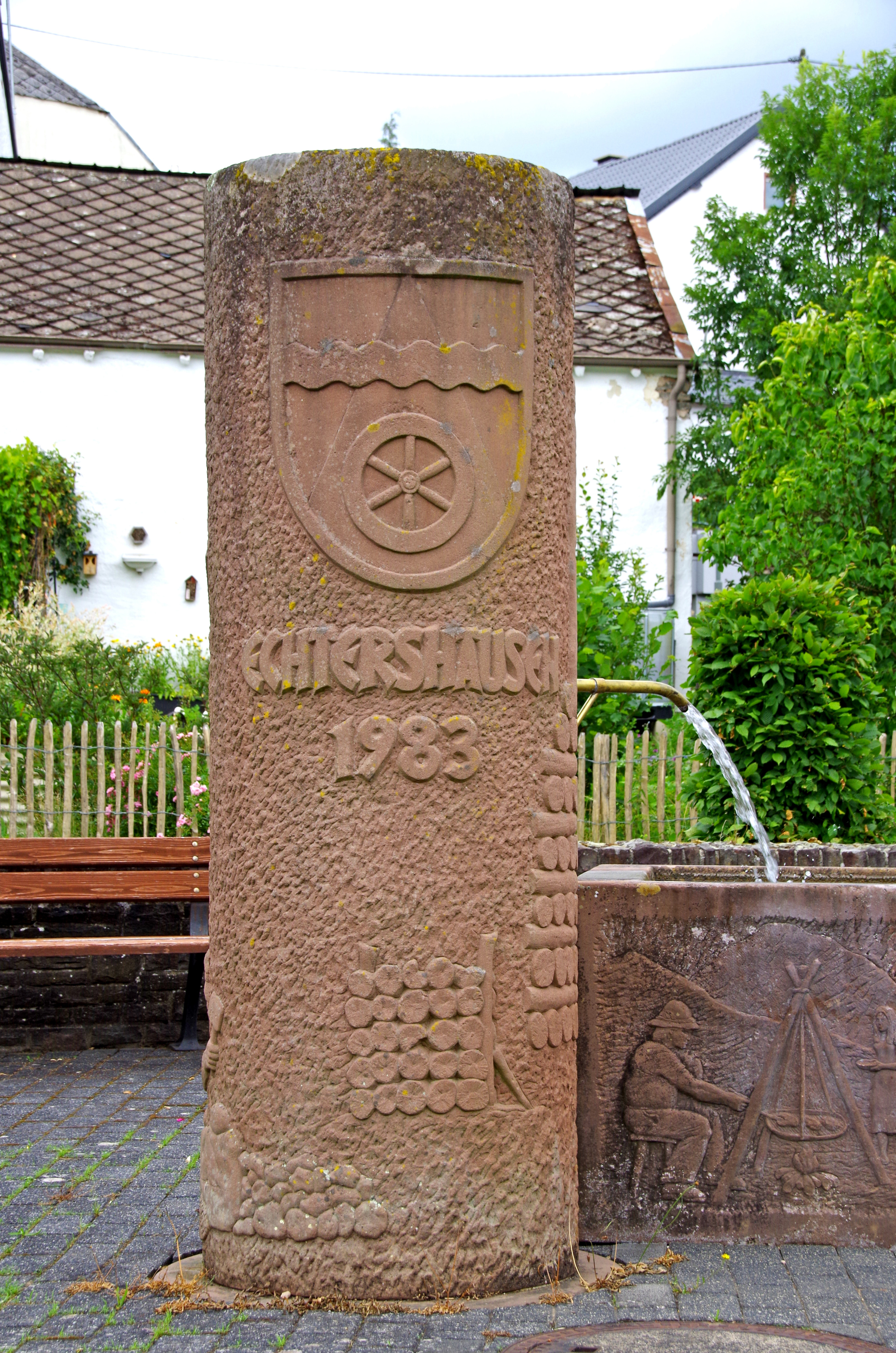 Echtershausen, Hauptstraße, Brunnen und Ortsstein mit Wappen (1983)